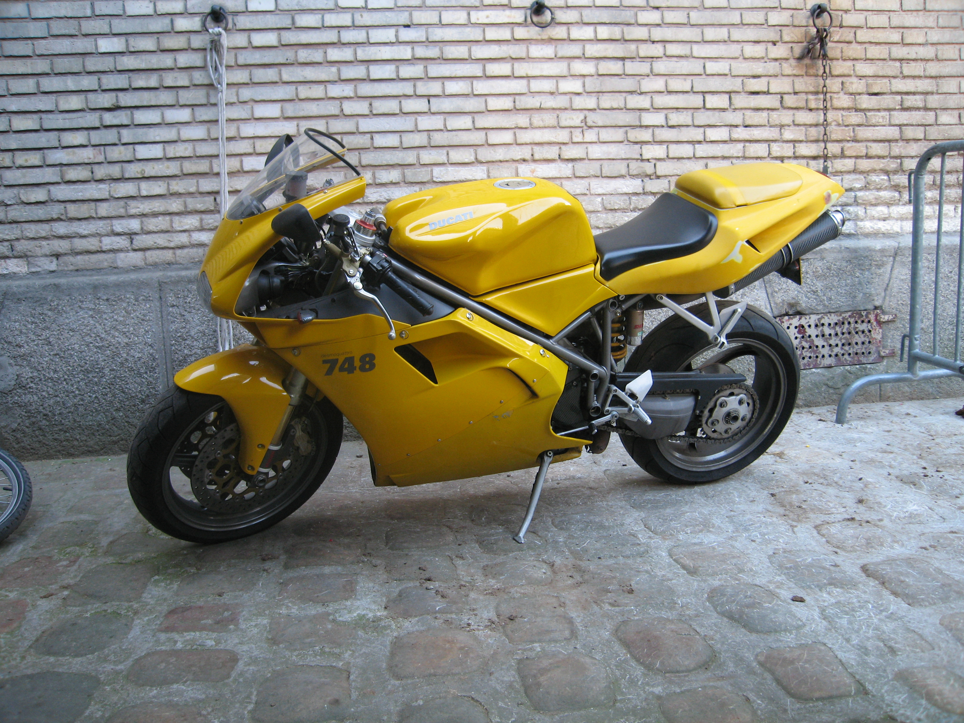 Ducati 748 jaune Ducati 748